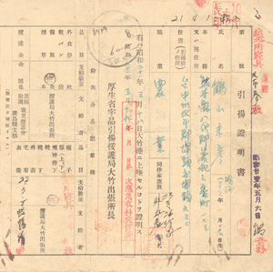 japan emigrant in Taiwan zn:日本移民村